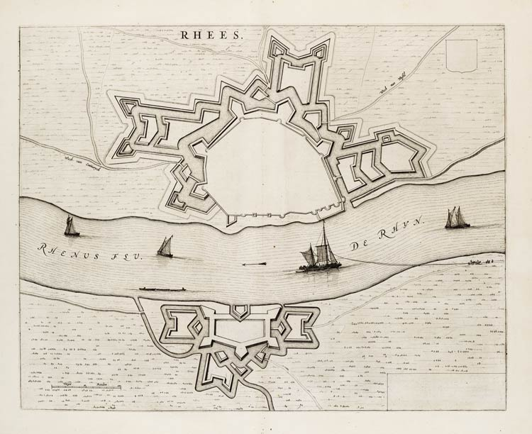 Karte der Festung Rees und Umland Joan Blaeu: Toonneel der Steden (1651)